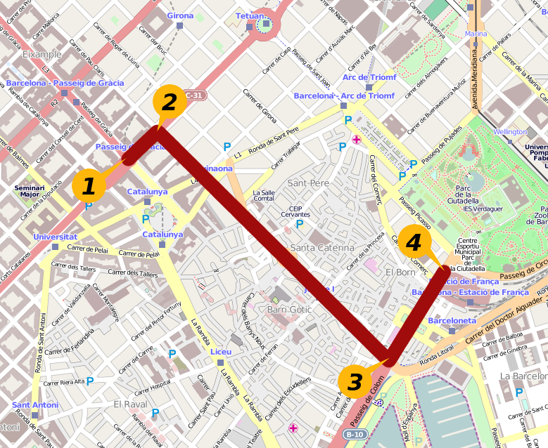 Recorregut de la Manifestació "Catalunya a Barcelona This map may be incomplete, and may contain errors. Don't rely solely on it for navigation.